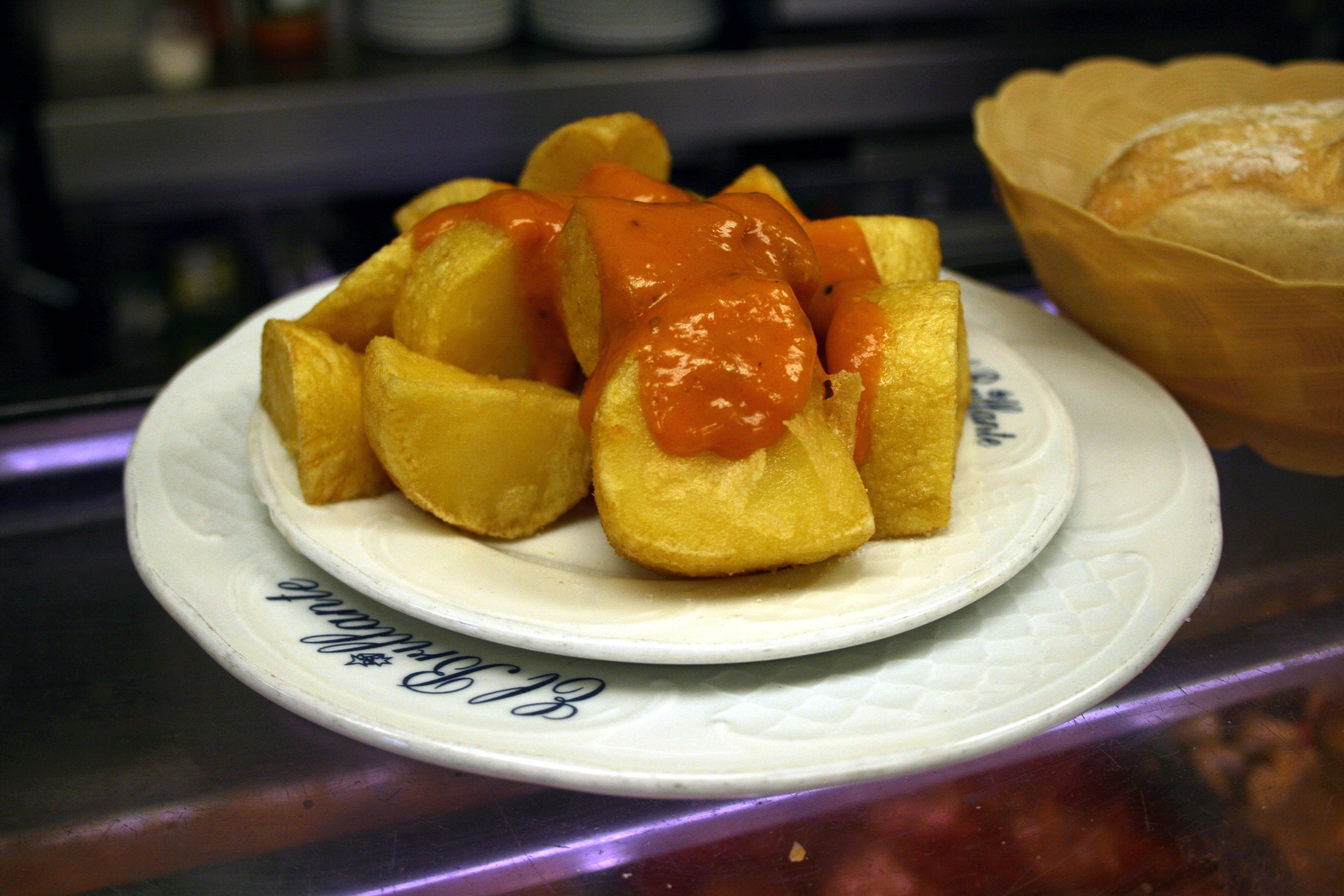 Patatas bravas aliñadas con su salsa picante